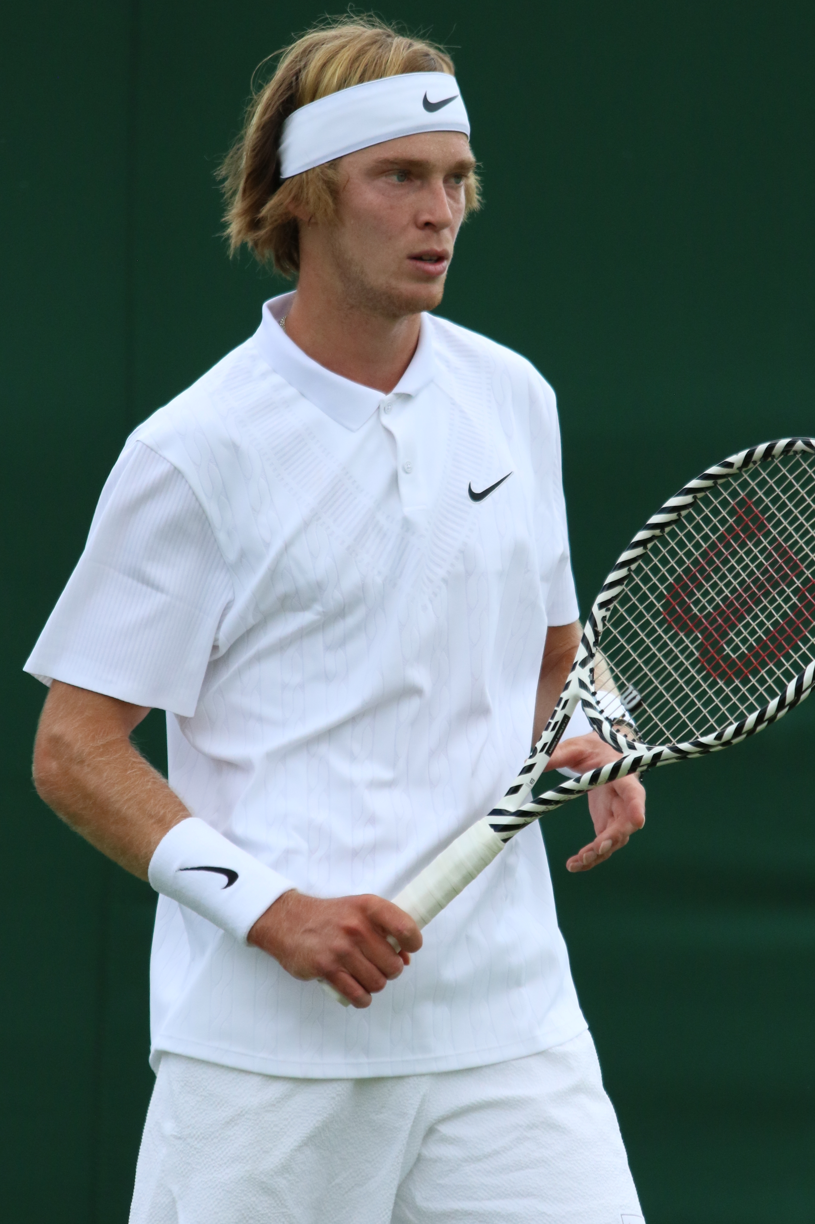 Rublev WM19 (36)